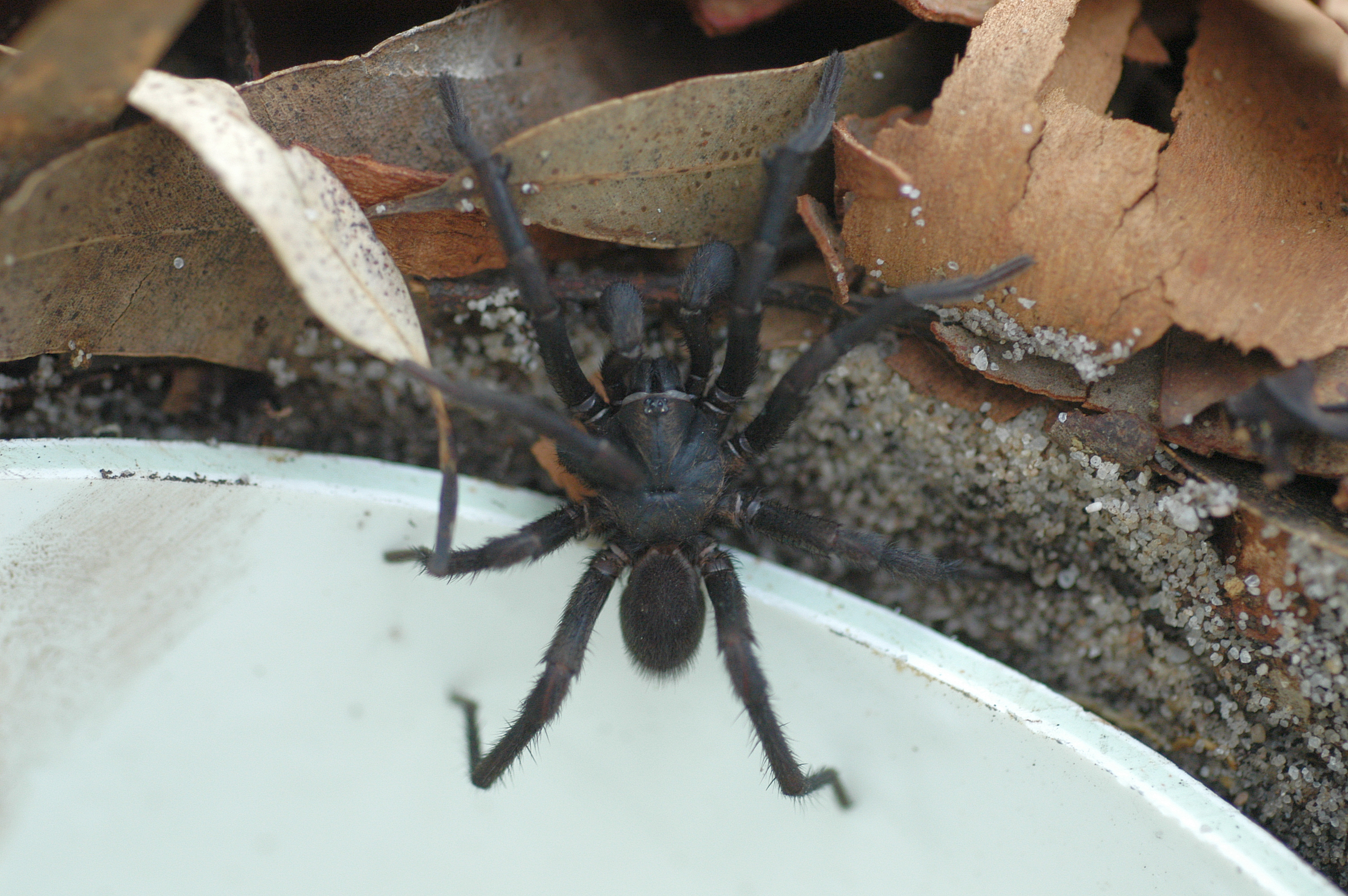 LFAWY7 - Funnel Web Spider